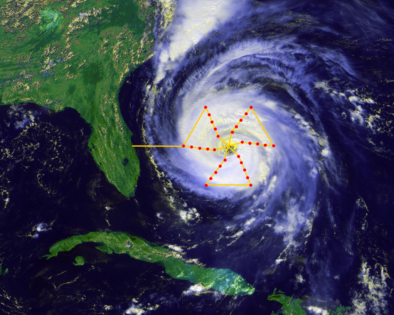 Fran vortex